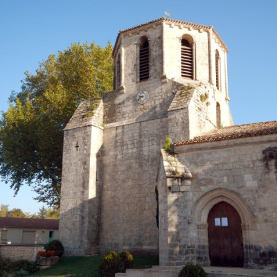 Église Saint-Médard-de-Germond : extérieur.